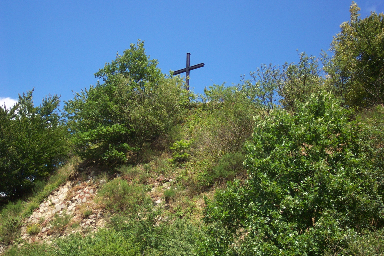 Gipfelkreuz auf dem Hummelsberg im Westerwald